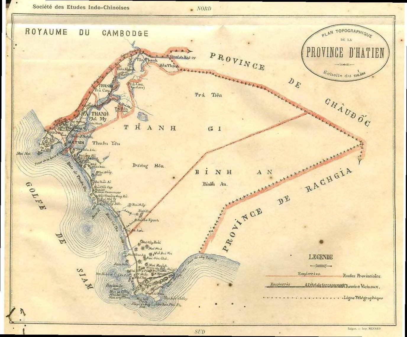 Bản đồ tỉnh Hà Tiên thuộc Pháp (khoảng năm 1901).